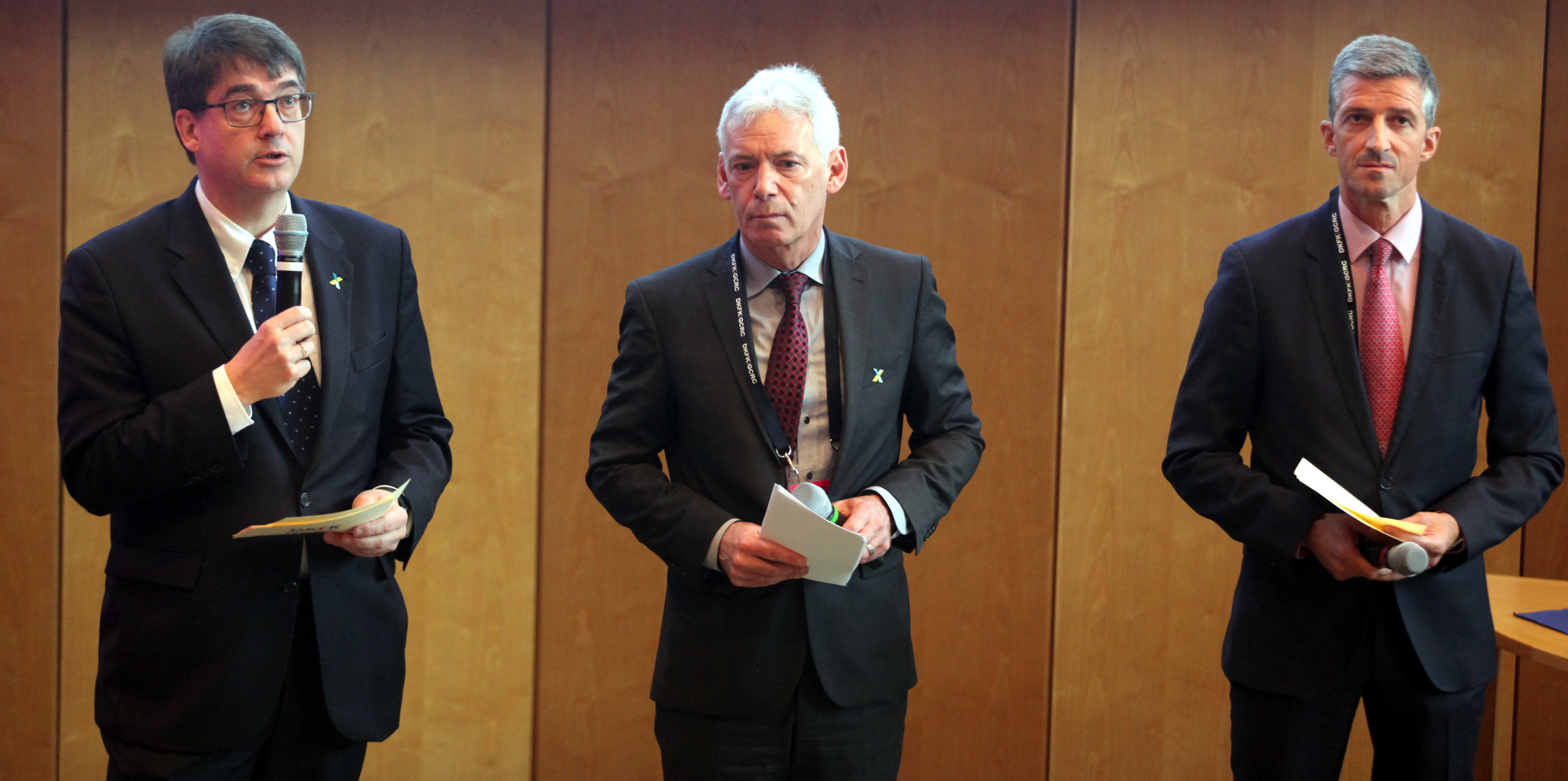 Peter Baumann (Vorstandsvorsitzender und Wissenschaftlicher Stiftungsvorstand des DKFZ), Gerd Nettekoven (Vorstandsvorsitzender der Deutschen Krebshilfe) und Frederik Wenz (Vorstandsmitglied der Deutschen Krebsgesellschaft), bei der Eröffnung der 1. Deutschen Krebsforschungskongresses am 4. Februar 2019 in Heidelberg